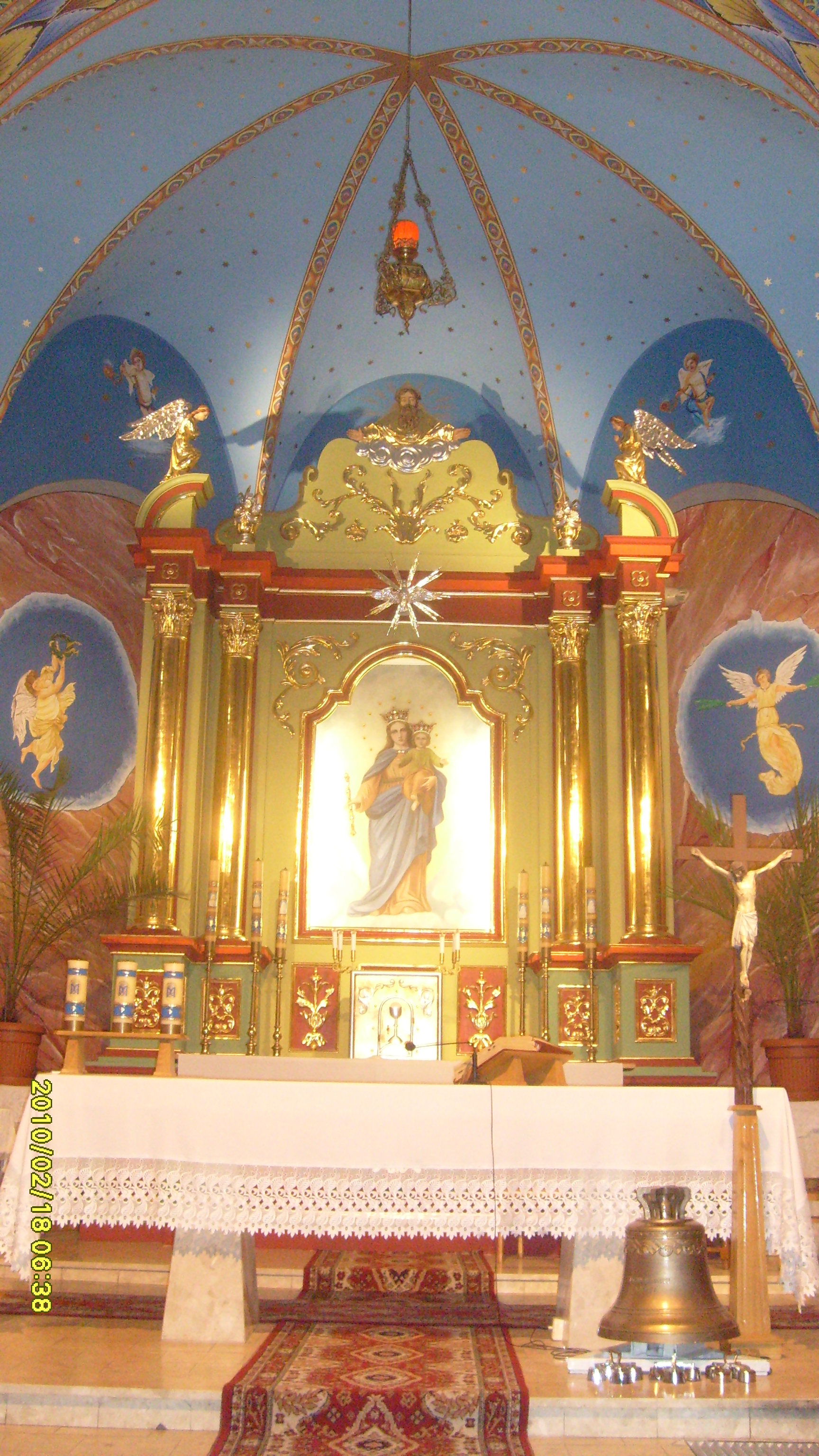 Ołtarz główny z odsłoniętym obrazem Matki Bożej